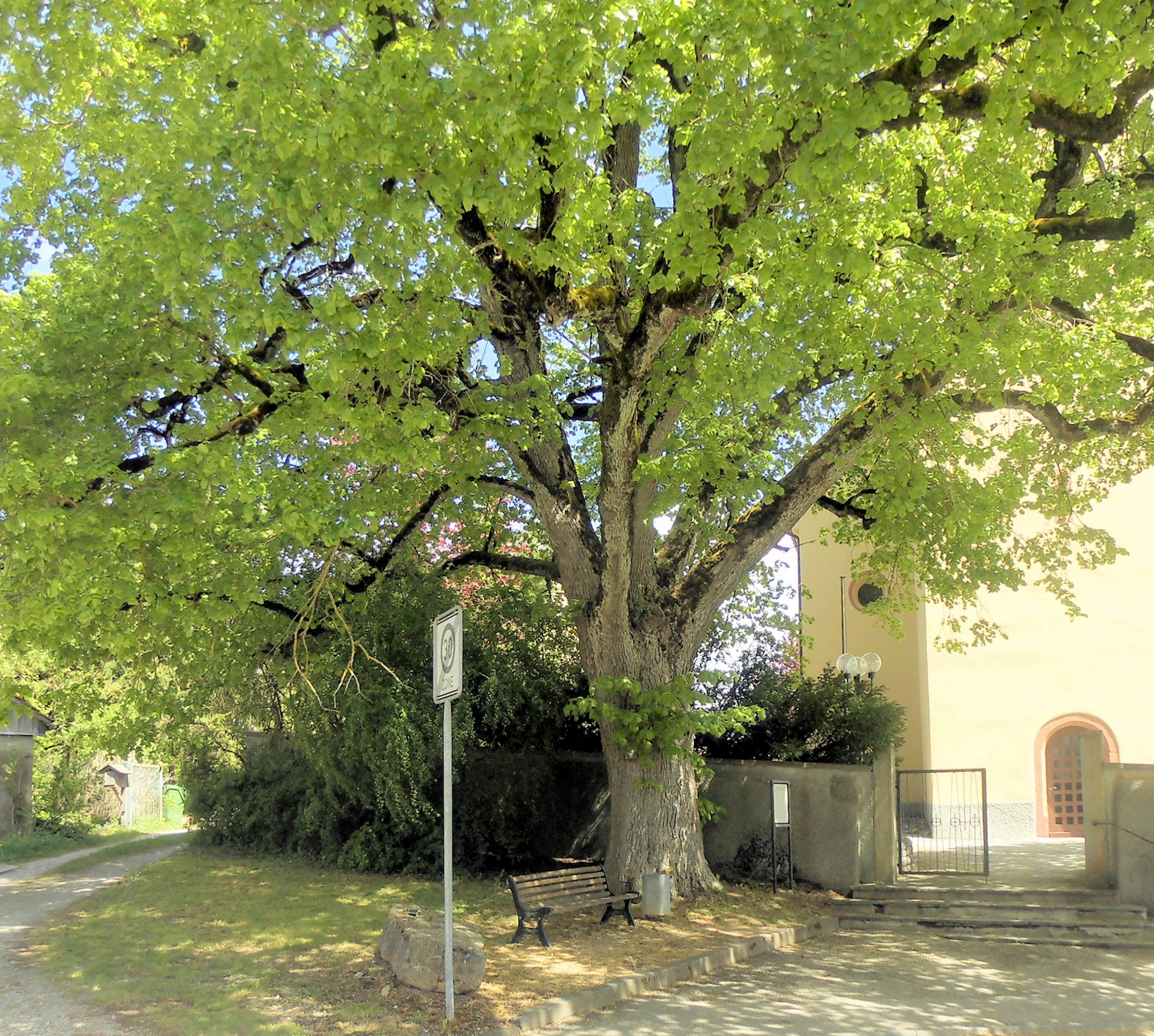 350jährige Winterlinde (Talia cordata) in Heidenhofen, Stadt Donaueschingen, Deutschland